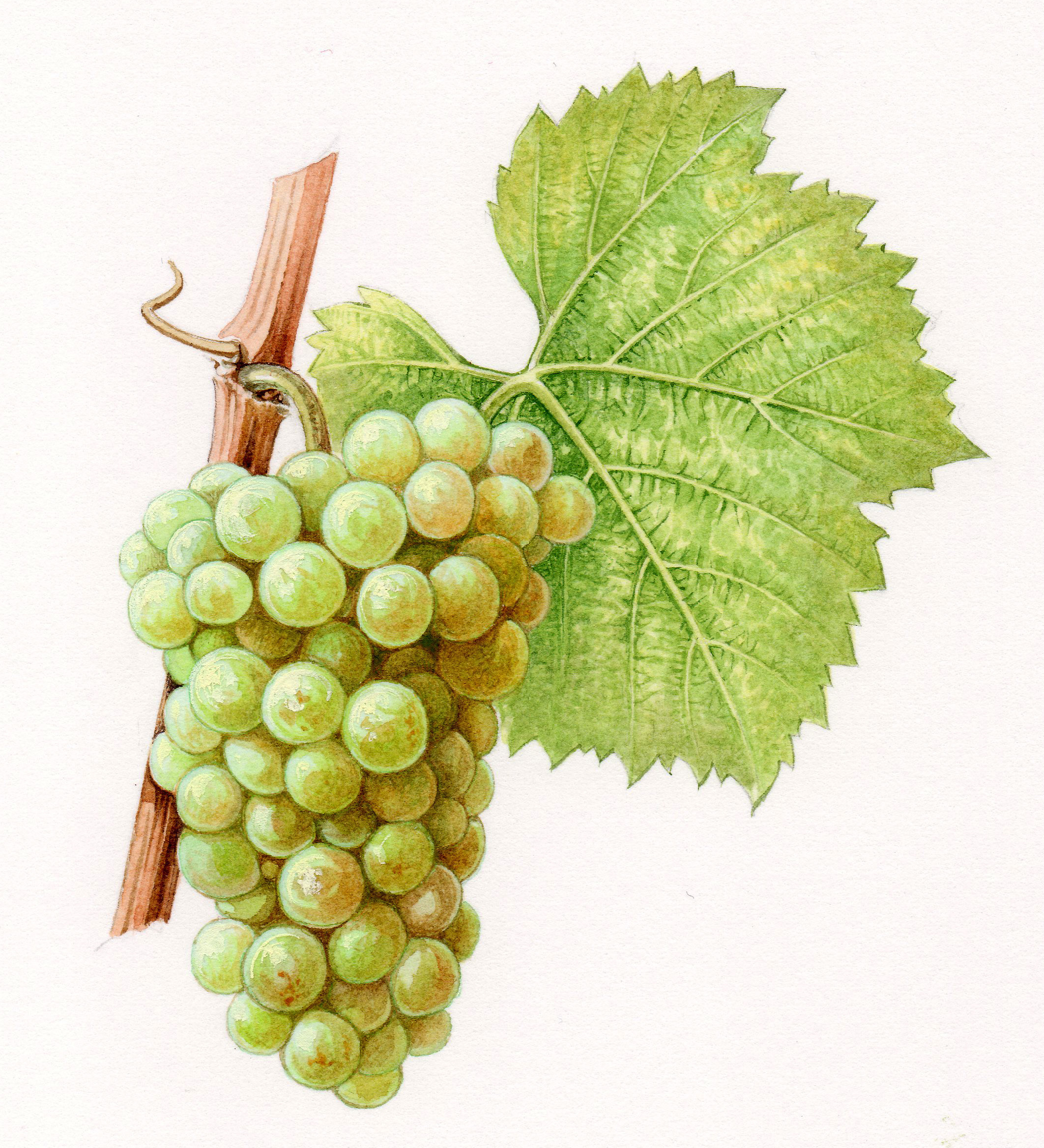 Aquarelles originales pour le Cépages de France (2001)